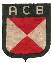 Нарукавна нашивка Астраханських козаків у складі Вермахту 1943 року